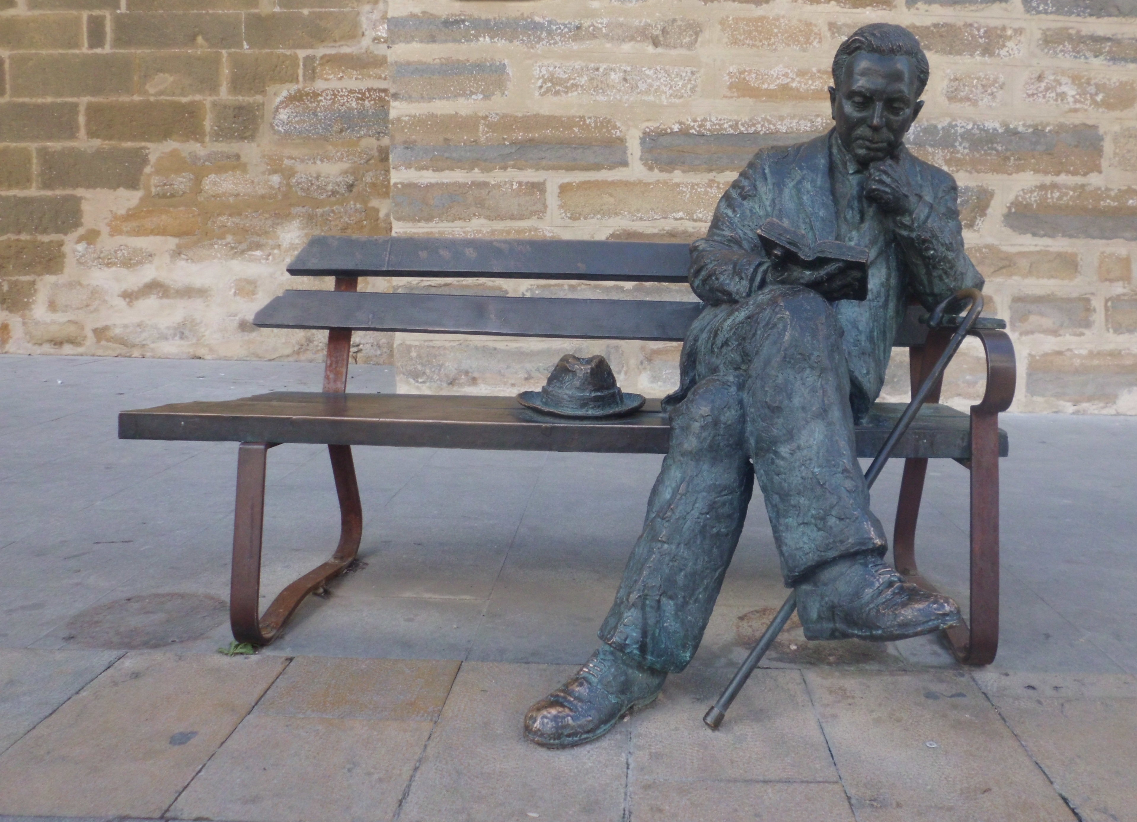 Fotografía de la estatua sedente de Antonio Machado, colocada en la calle san Pablo de Baeza (Jaén), que he tomado con mi cámara digital CASIO EXILIM (14.1 MP 26 mm) la mañana del 18 de noviembre de 2016. Posteriormente, la he recortado con Picasa 3.